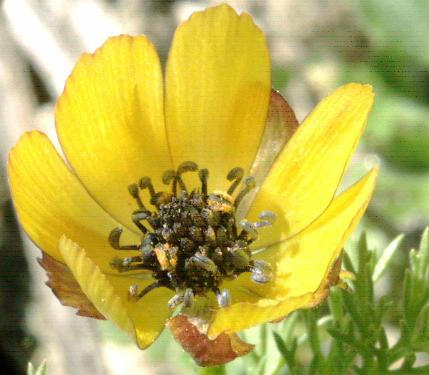 Fotografía realizada por Pablo Alberto Salguero Quiles en el mes de abril en Aranjuez Madrid España. La fotografía no es muy buena pero muestra diferencias definitorias entre las adonis.